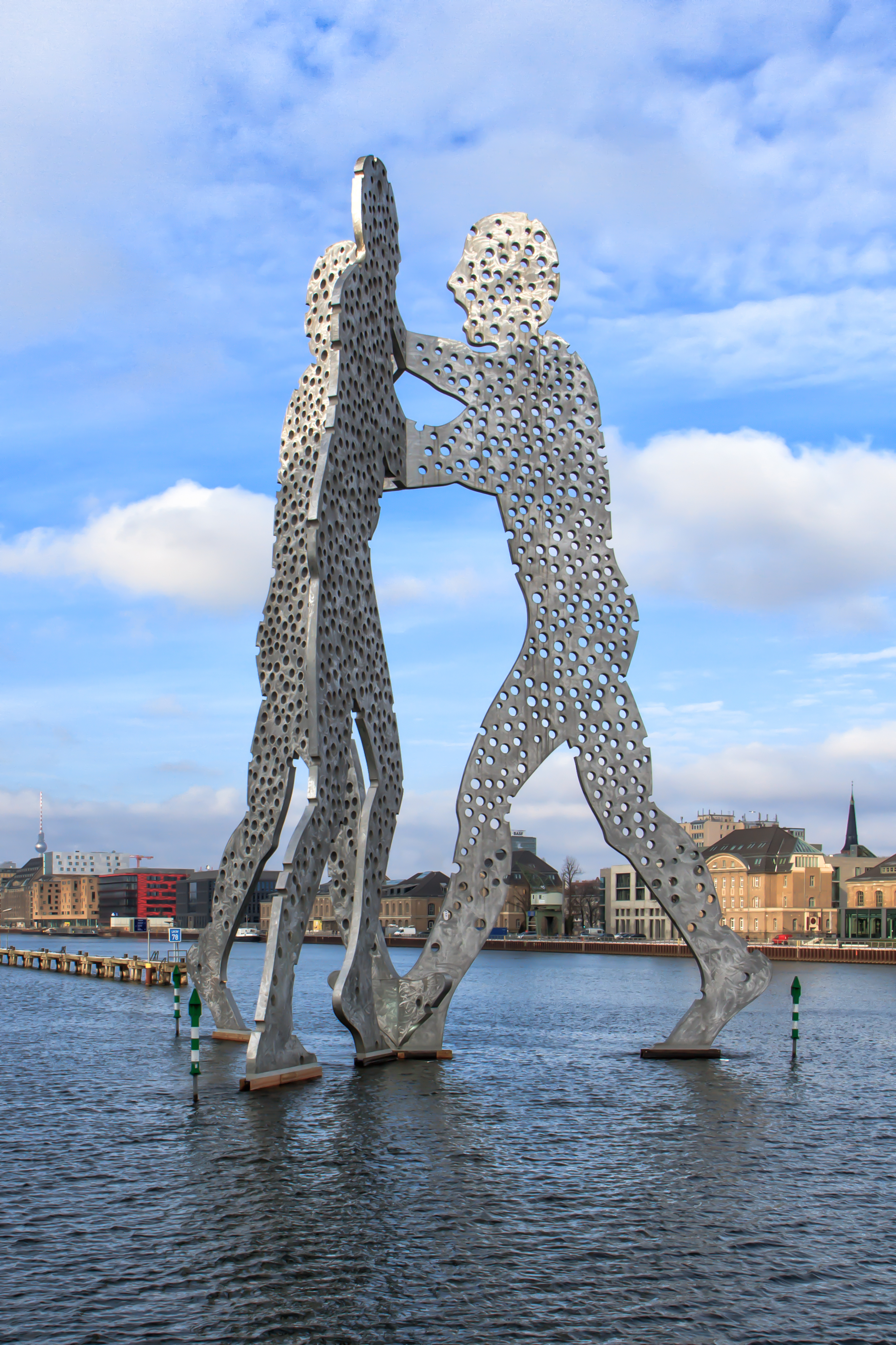 Die Skulptur 'Molecule Man' in Berlin-Treptow, 2013